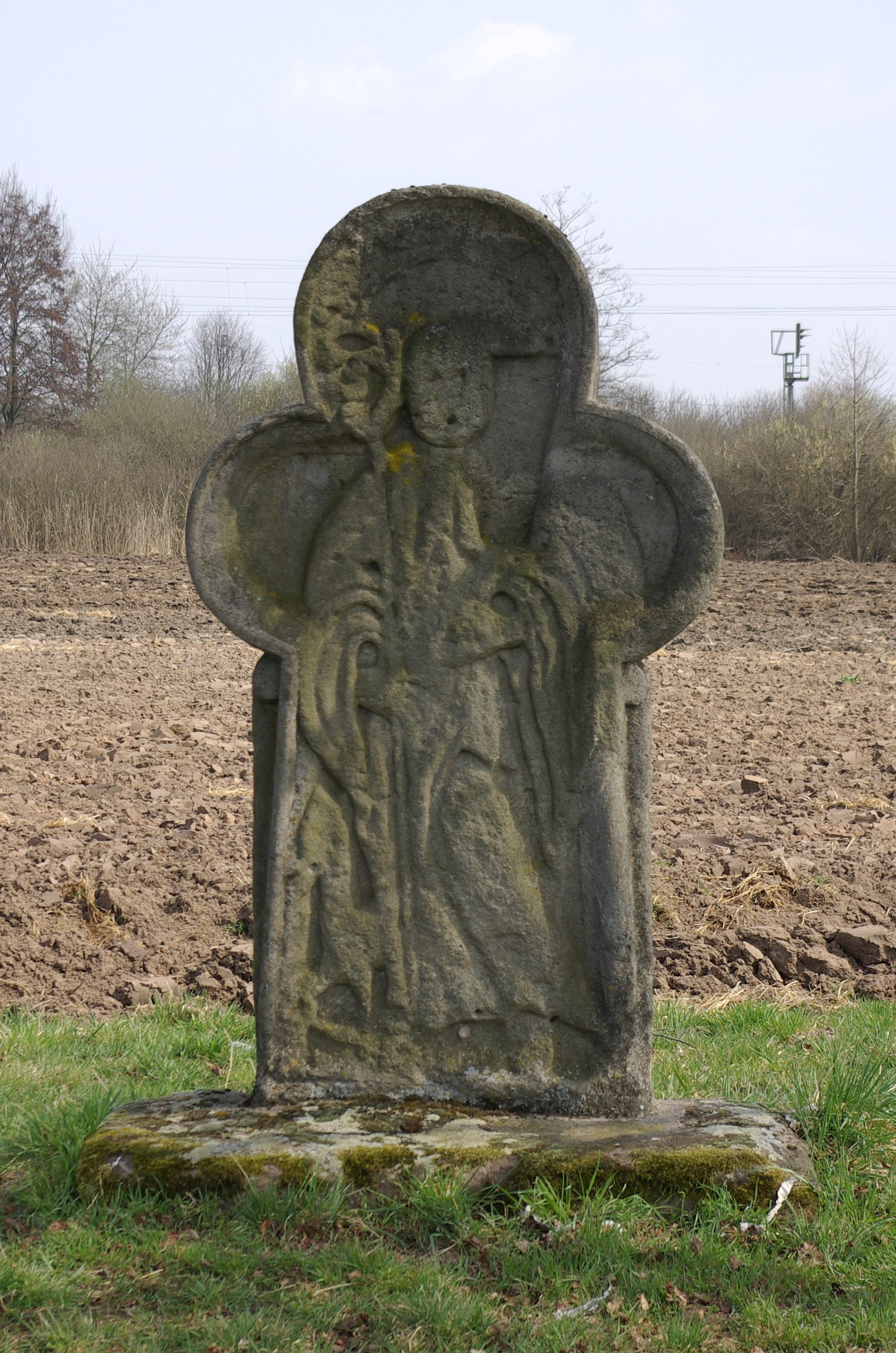 Der Egidienstein, ein mittelalterliches Steinkreuz, im Erlanger Stadtteil Eltersdorf